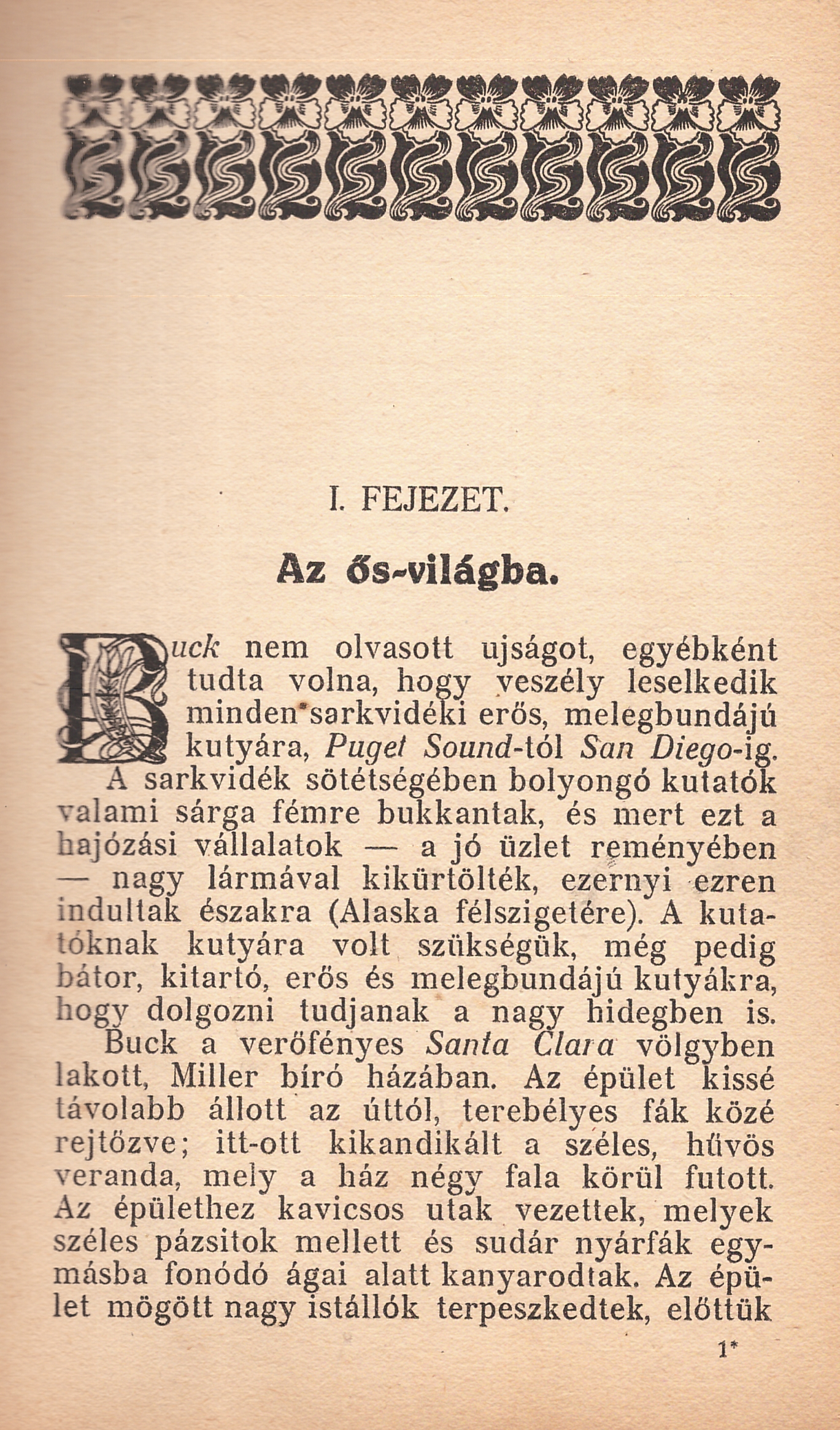 A Vadon szava egyik korai kiadásának első oldala.